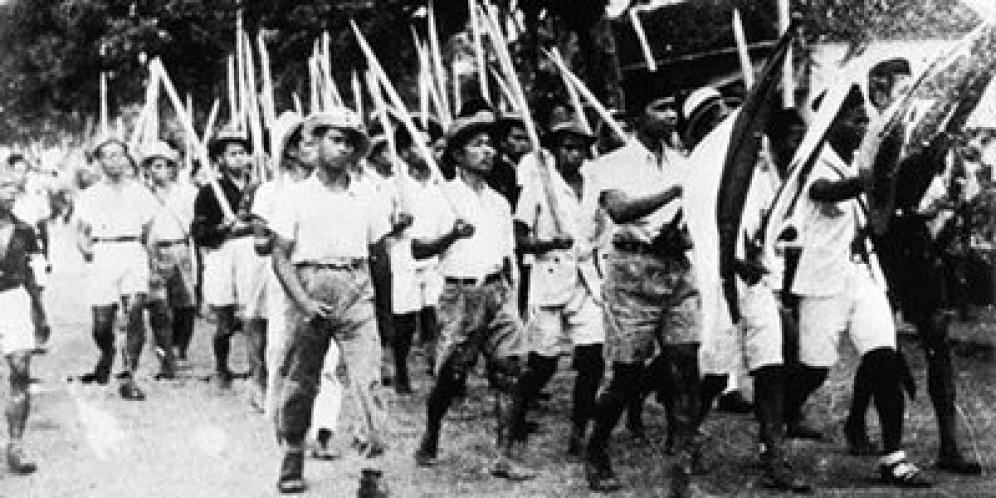 Barisan Tole Iskandar masa perjuangan. dulu